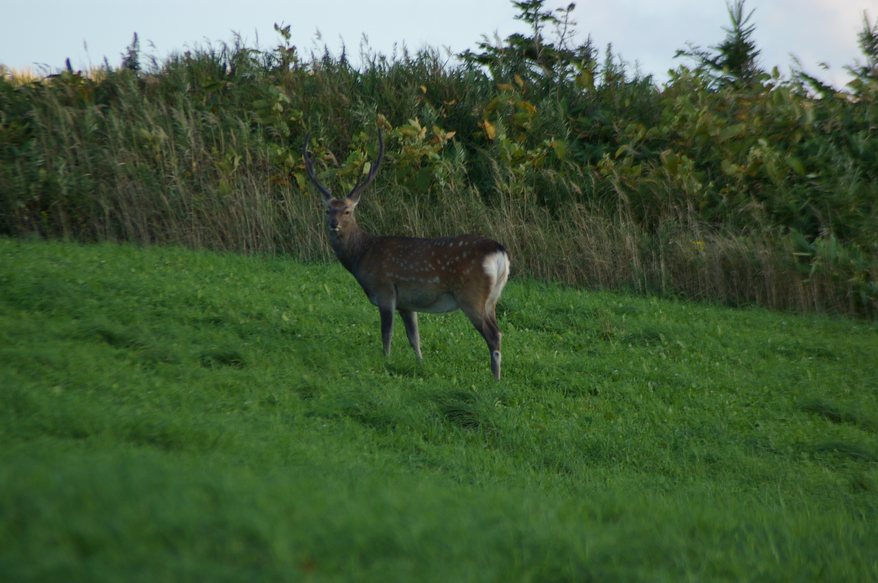 C.n.yesoensis.